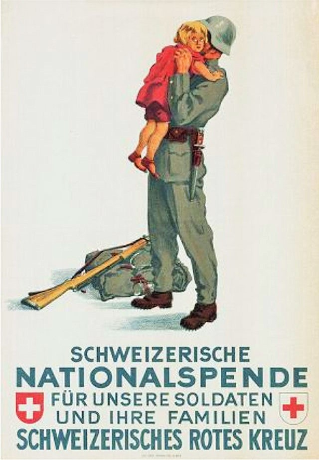 Postkarte Schweizerische Nationalspende, Schweiz: 1940